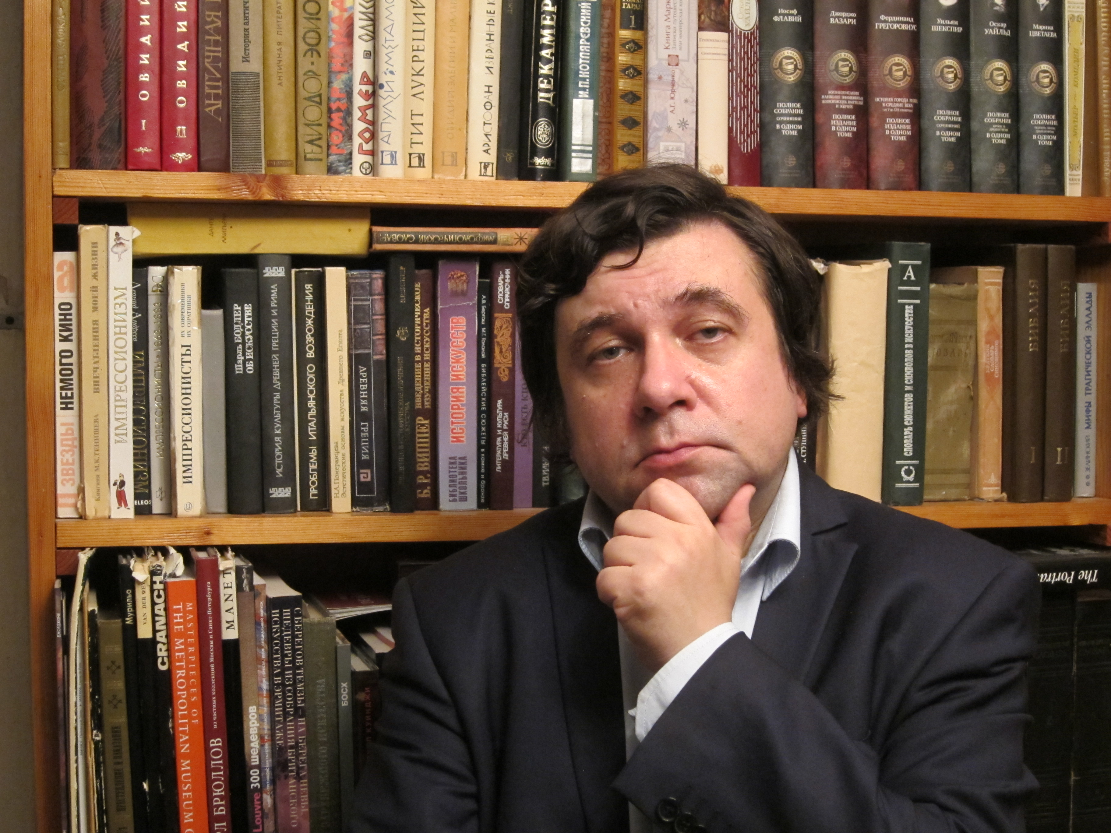 Чернобривец, Пётр Анатольевич. Композитор, музыковед, музыкальный педагог